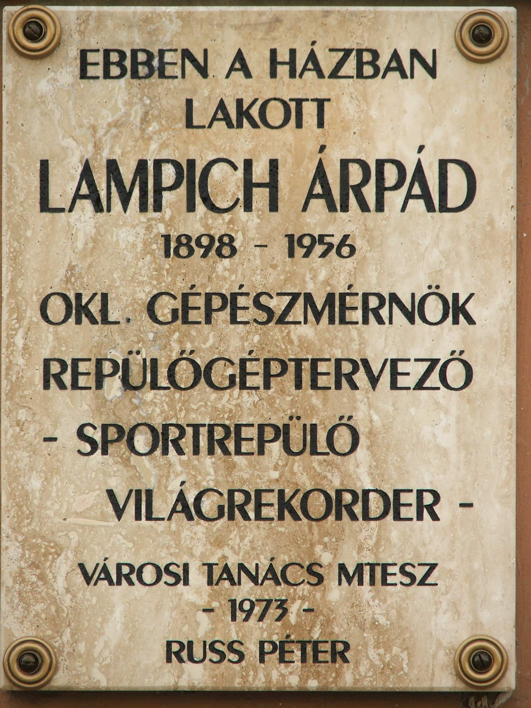 Lampich Árpád emléktáblája a Koller-házon